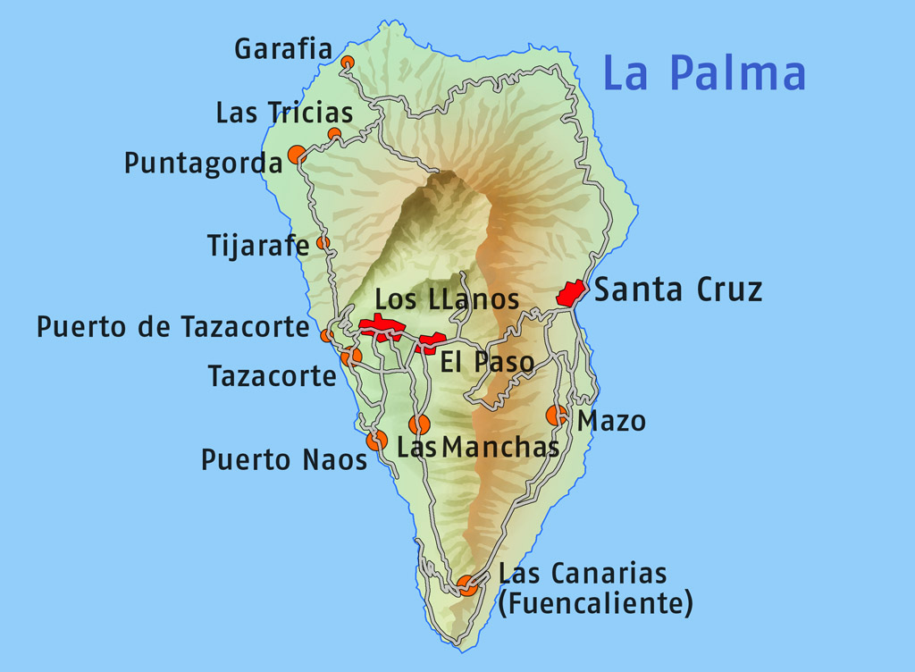 La Palma map, roadmap